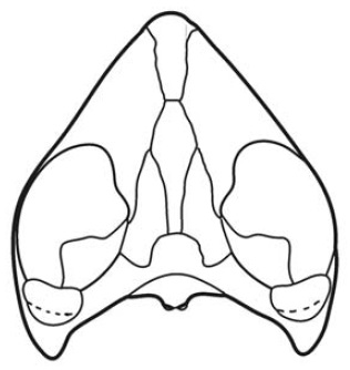 Erquelinnesia gosseleti from the Upper Paleocene (Thanetian) of Belgium (Zangerl 1971)